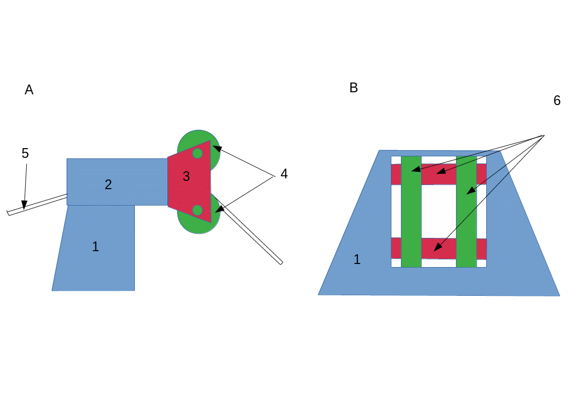 Universālā un automātiskā klīze